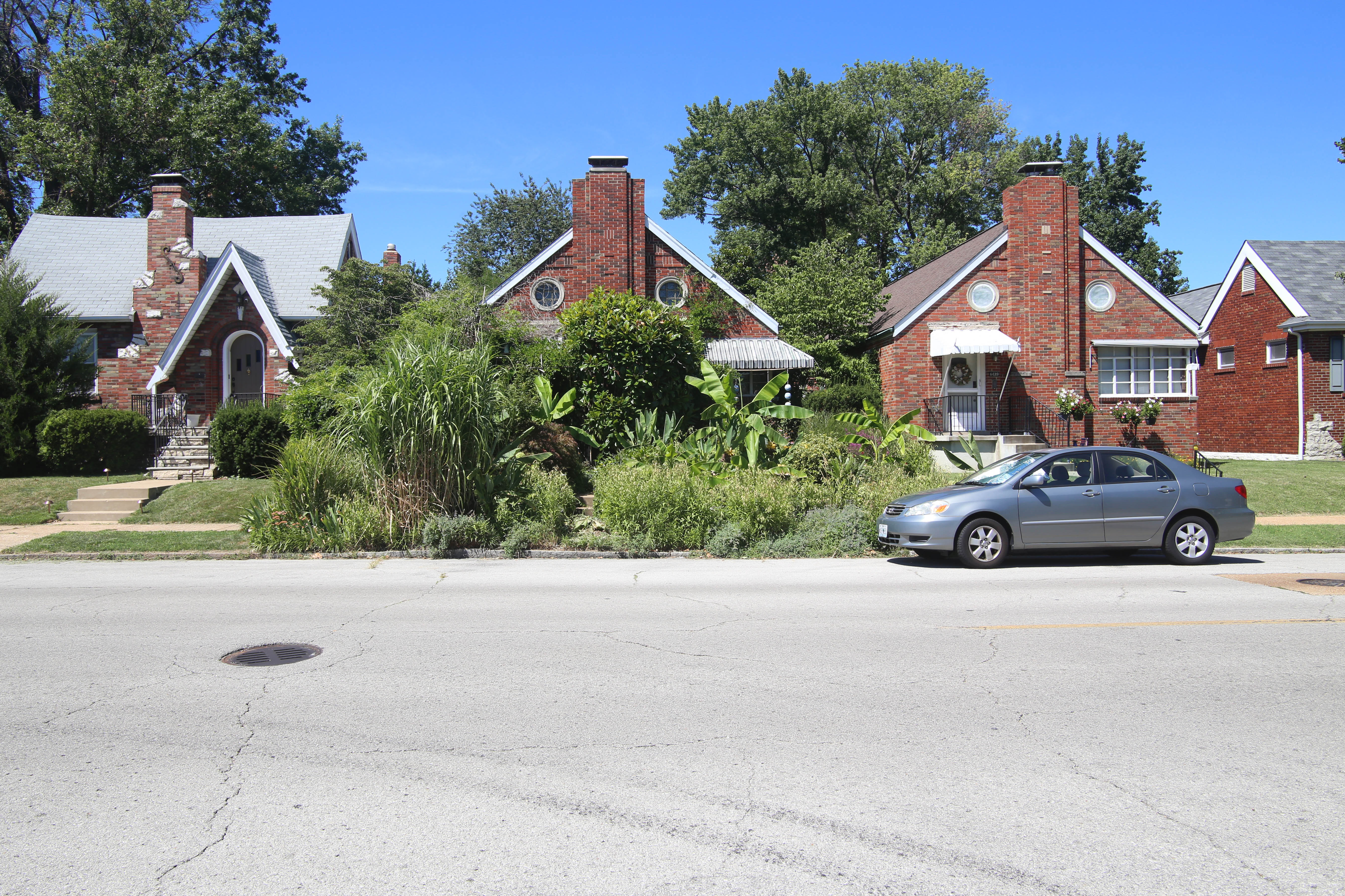 Lindenwood Park Homes